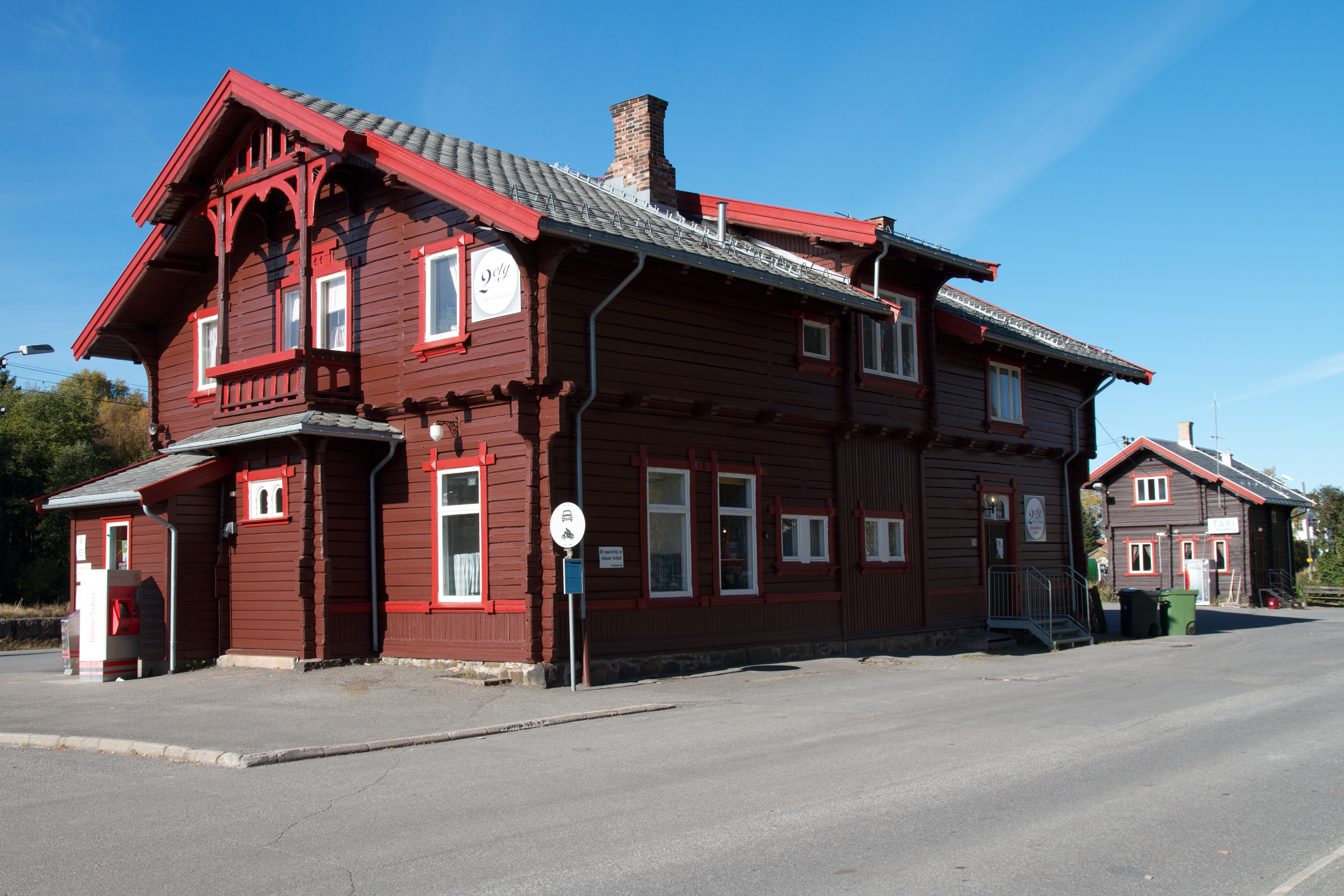 Gran stasjon i Oppland.